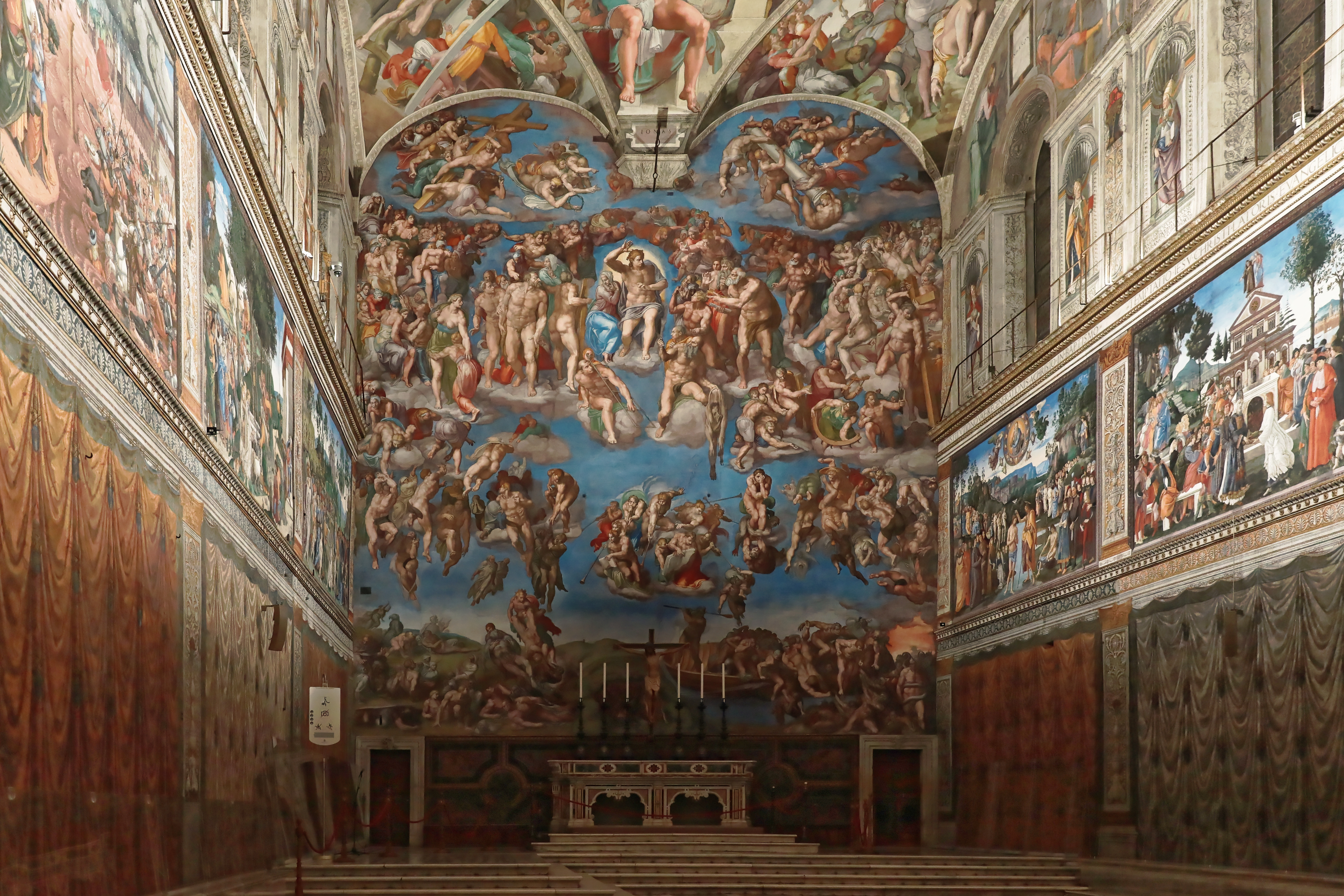 Blick in den Kapellenraum mit Altar